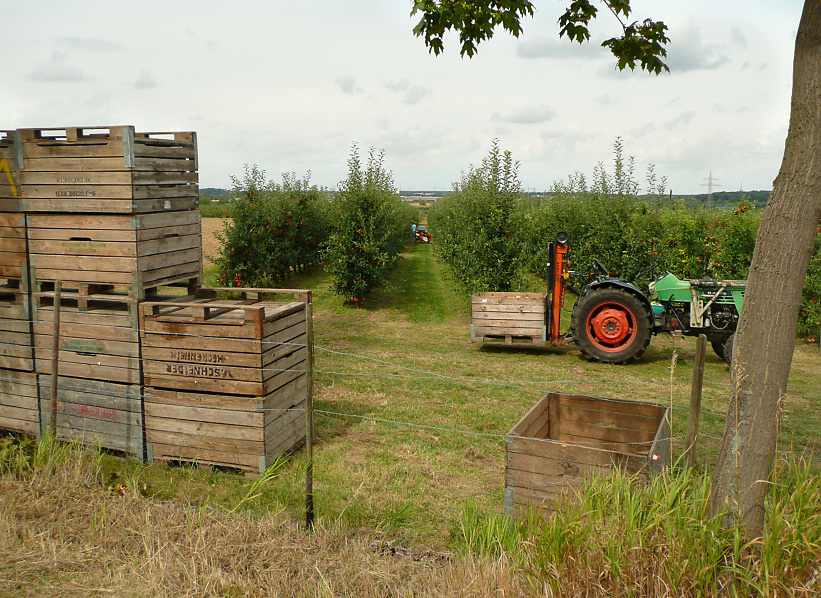 Apfelernte in den weitläufigen Obstplantagen um Meckenheim im Rheinland, Deutschland